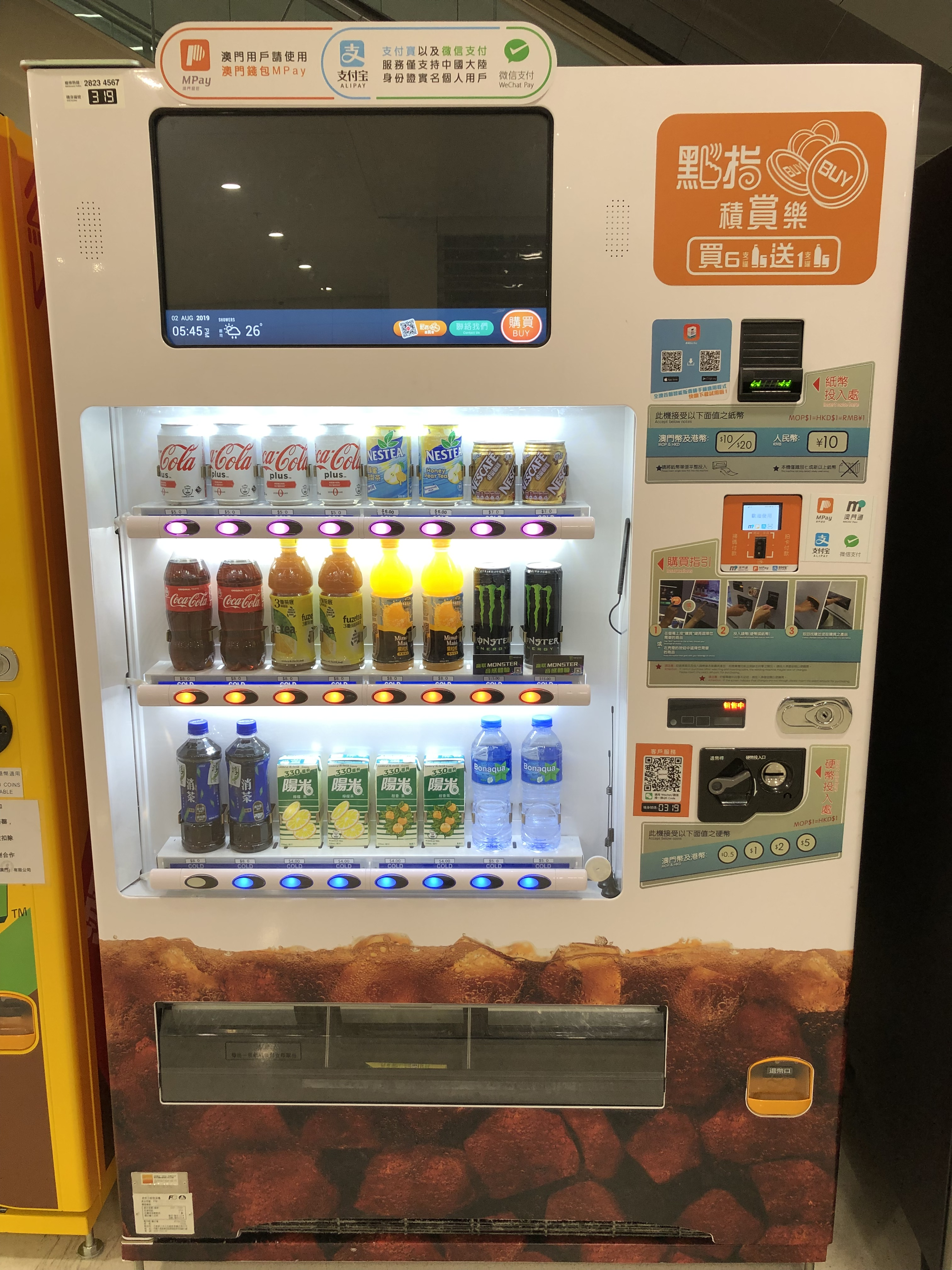 中文（台灣）: 可口可樂(澳門)有限公司的新款自動販賣機，接受支付寶、微信支付、澳門通卡、澳門錢包掃碼購買飲料。